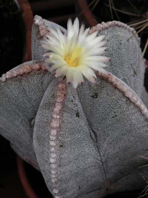 Description: Astrophytum myriostigma, août 2004, collection personnelle